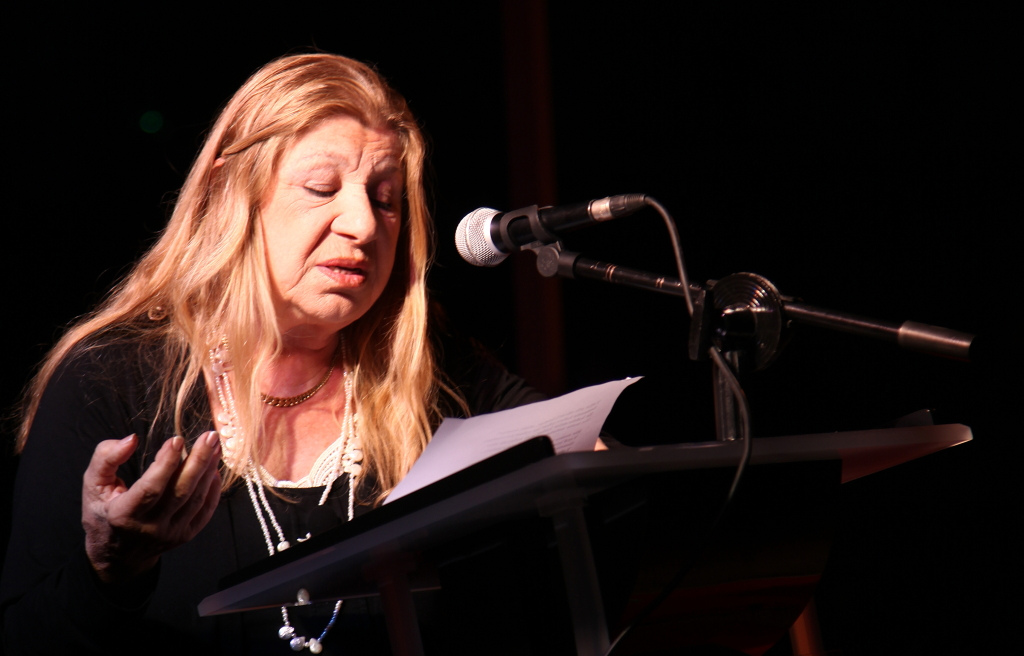 Ayla Algan